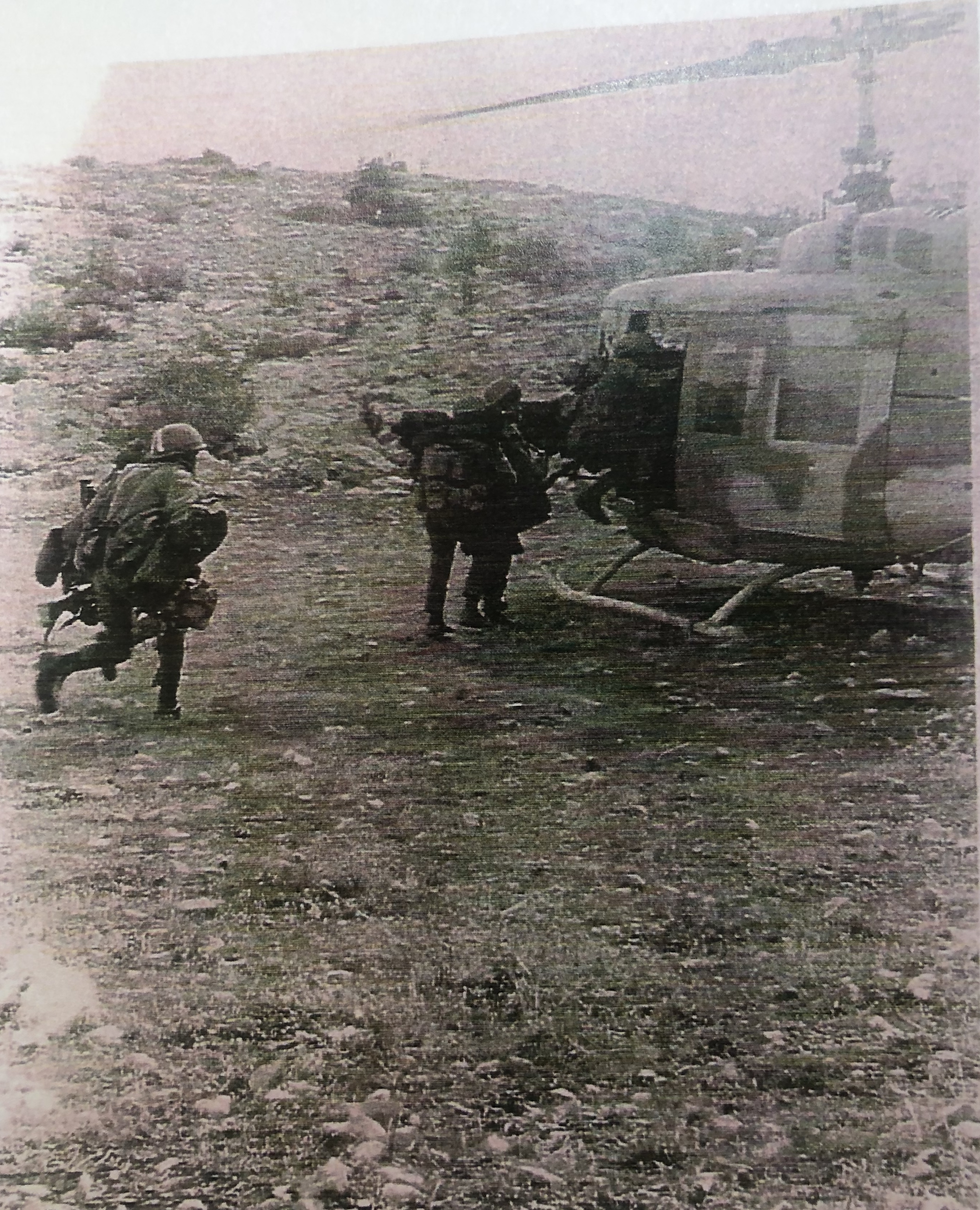 תמונה שצולמה במהלך הקרב